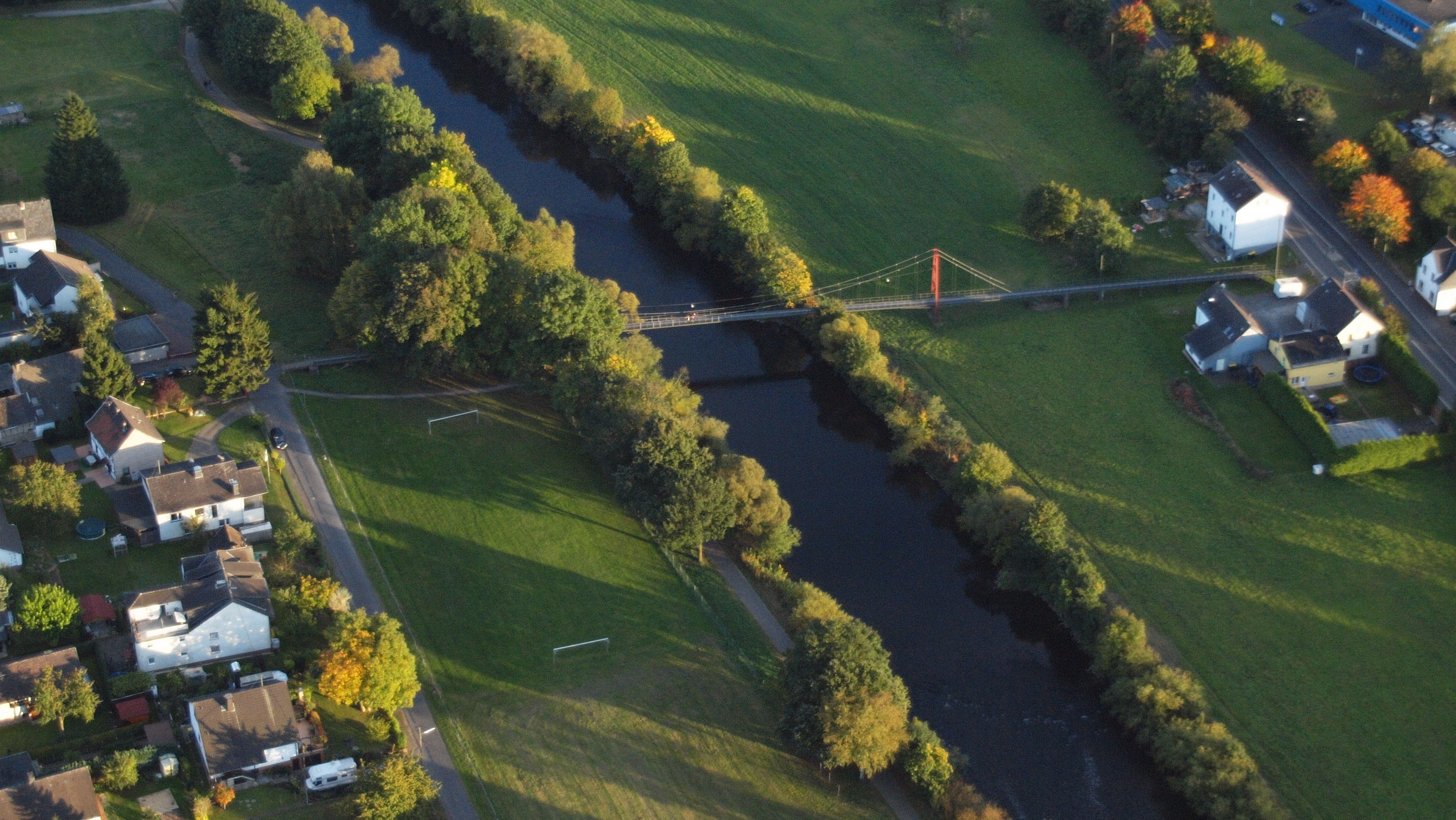 Halfter Fähre, Alzenbach, Eitorf